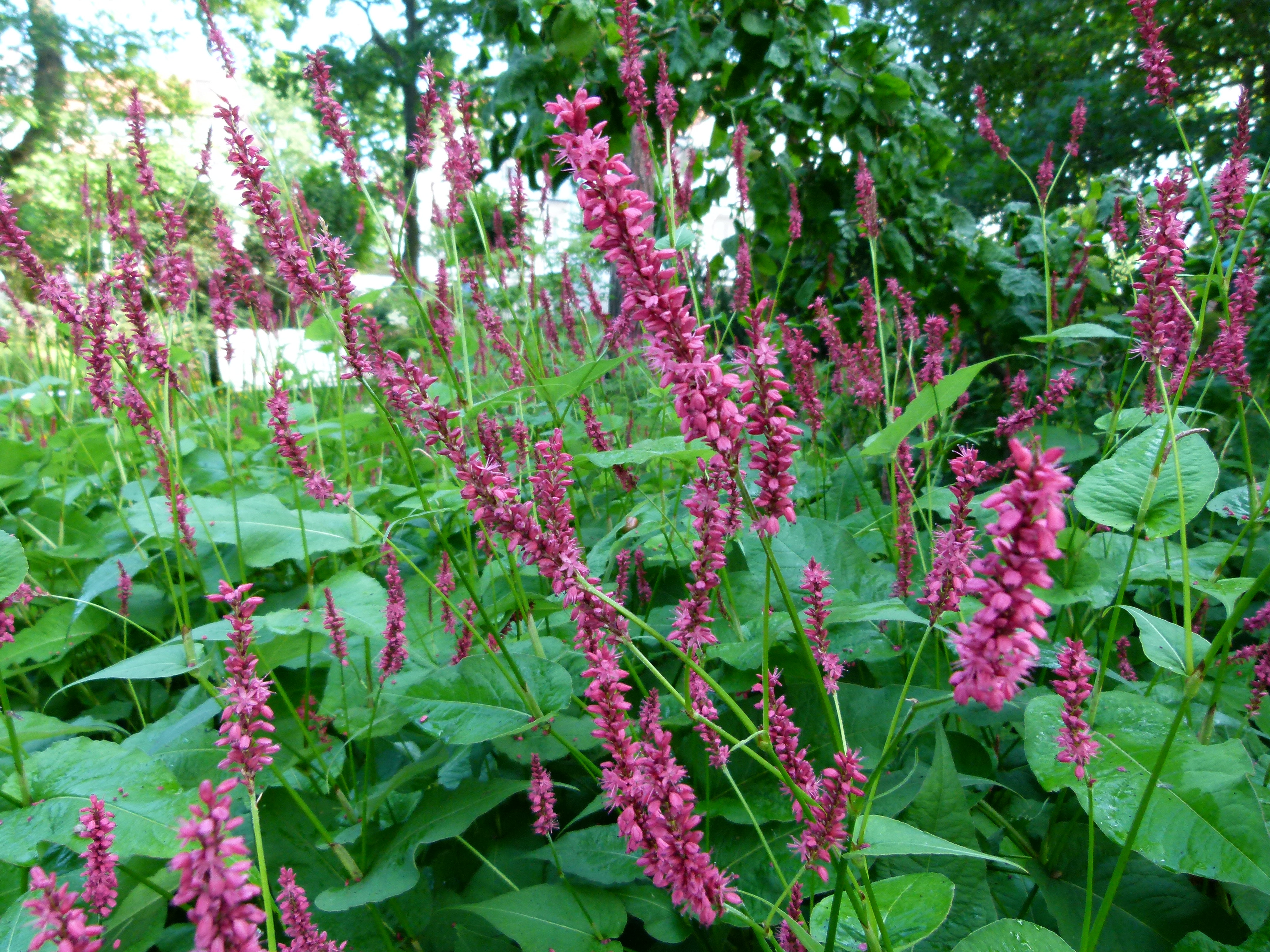 Photos taken summer 2011 in Binz (Rügen) on the Baltic sea. Fotos Sommer 2011 Binz (Rügen) an der Ostsee. Photos été 2011 Binz (Rügen) station balnéaire de la Baltique.